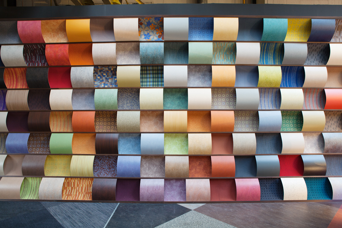 Forbo Flooring Systems bietet ein breites Produktangebot von Bodenbelägen und Bauklebstoffen.